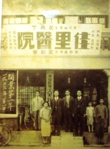 中文（台灣）: 1933年1月1日臺南醫師吳新榮等於佳里醫院前Bân-lâm-gú: 1933 nî 1 goe̍h chhe 1, Tâi-lâm i-seng Gô͘ Sin-êng téng-téng tī Ka-lí I-īⁿ chêng.